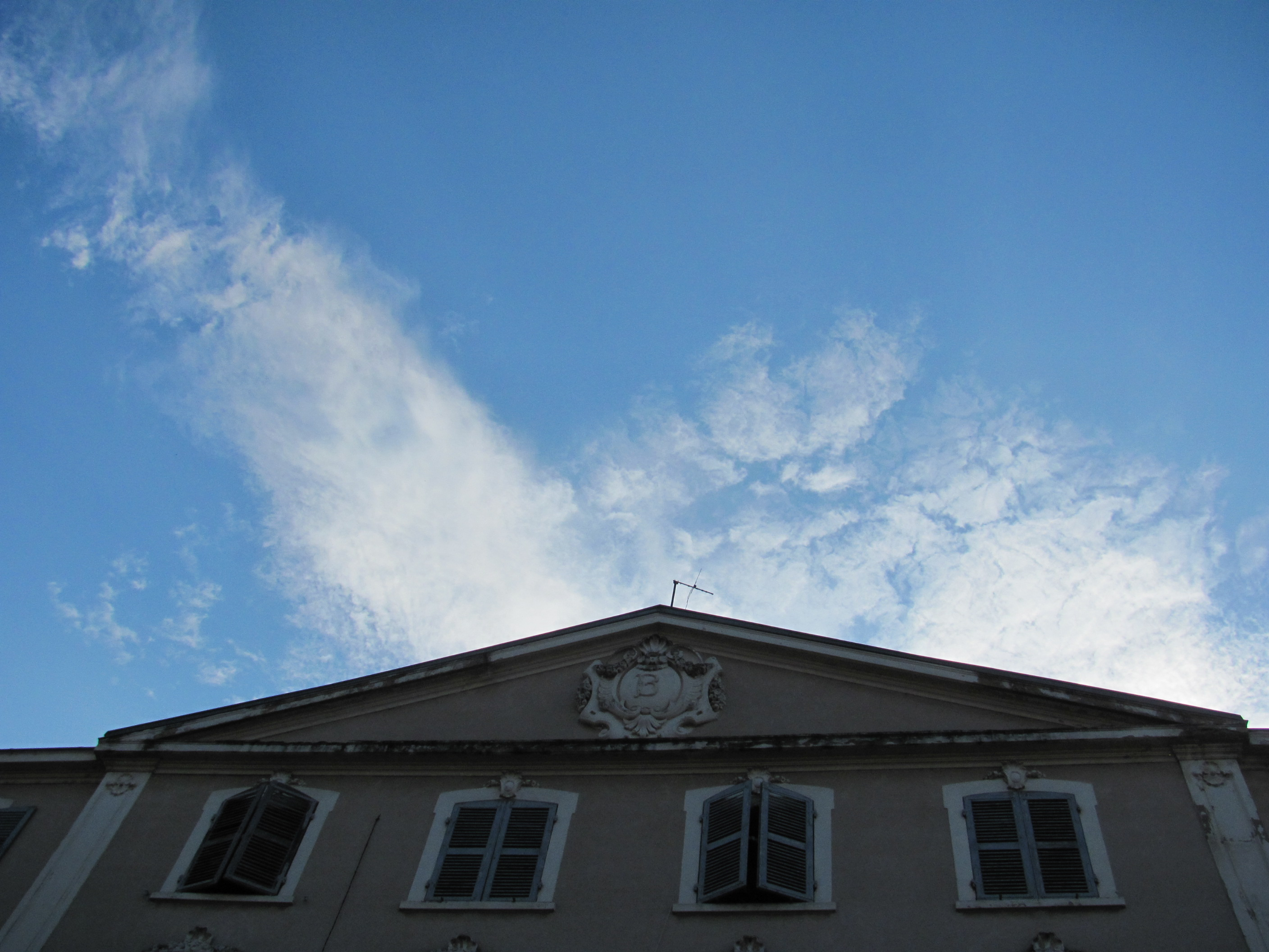 Hôtel de Condé à Montluel, .